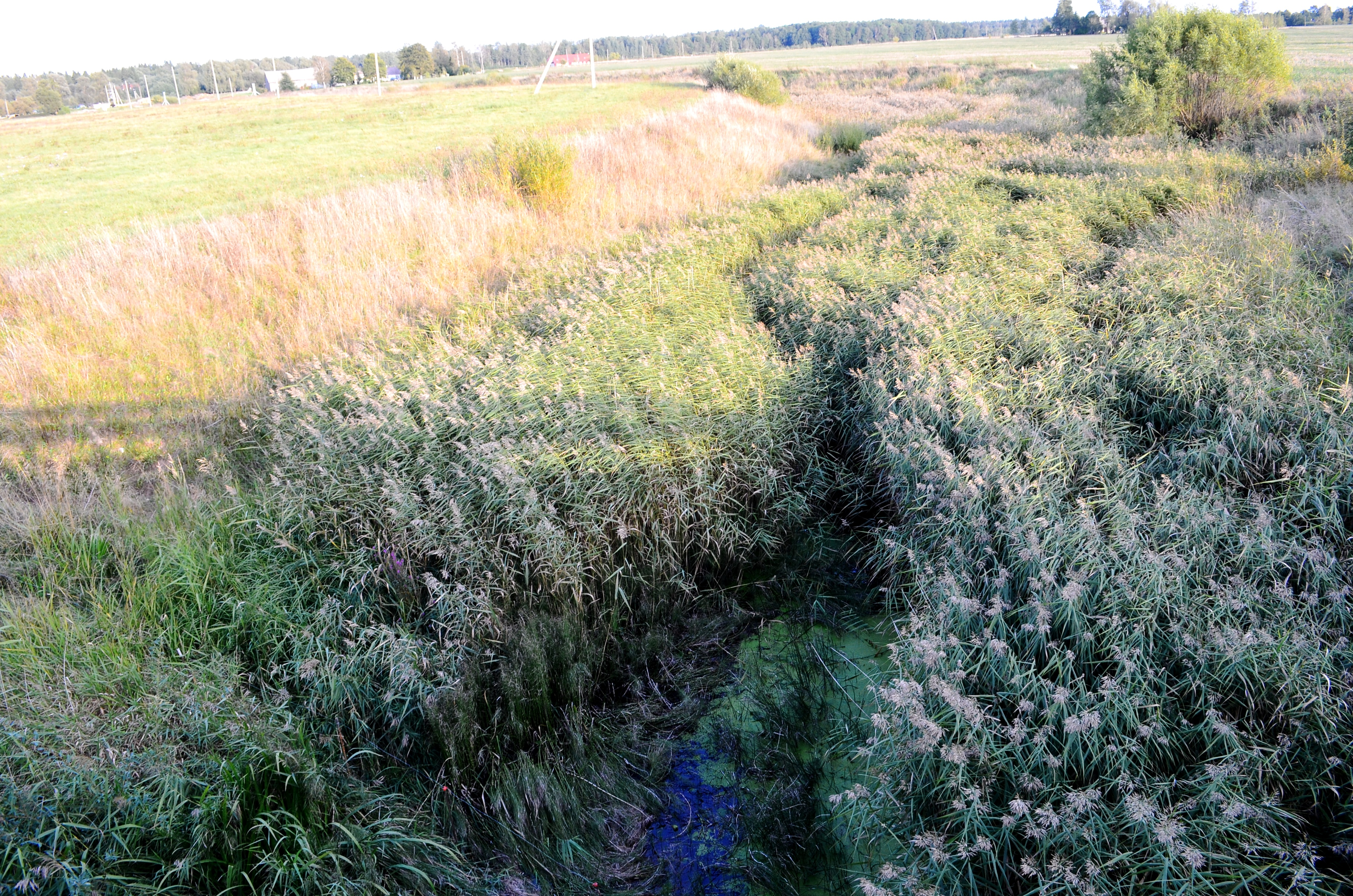 Beržė šalia Linkaičių, Radviliškio raj.